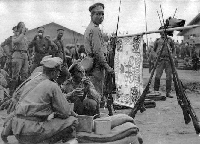 L'Armée Russe à Salonique (1916). Le drapeau du régiment.